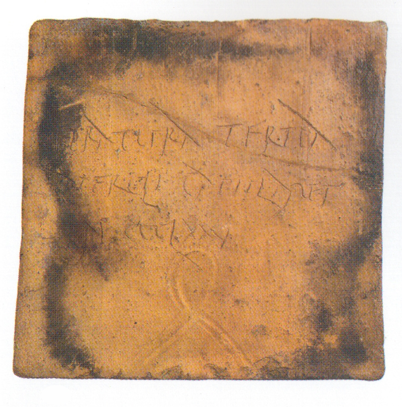 Kapitellziegel aus der Villa rustica Haselburg bei Höchst i. Odw. mit Ritzinschrift. Gefunden 1839, heute im Hessischen Landesmuseum Darmstadt (Foto W. Fuhrmannek, HLMD). Mit freundlicher Genehmigung des Museums. Die Lesung der Inschrift lautet: stratura tertia laterc[u]li capit[u]lares n(umerus) CCCLXXV (Übersetzung: „Dritte Lage Kapitellziegel 375 Stück“).RKO 16